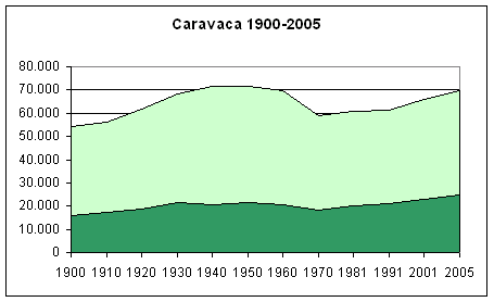 Población comparativa en el conjunto de la comarca The population of Caravaca de la Cruz, Murcia, Spain, (1900-2005) (dark green) in the context of the "comarca del Noroeste" region (light green). Own work, given to PD. Source: Instituto Nacional de Estadística.